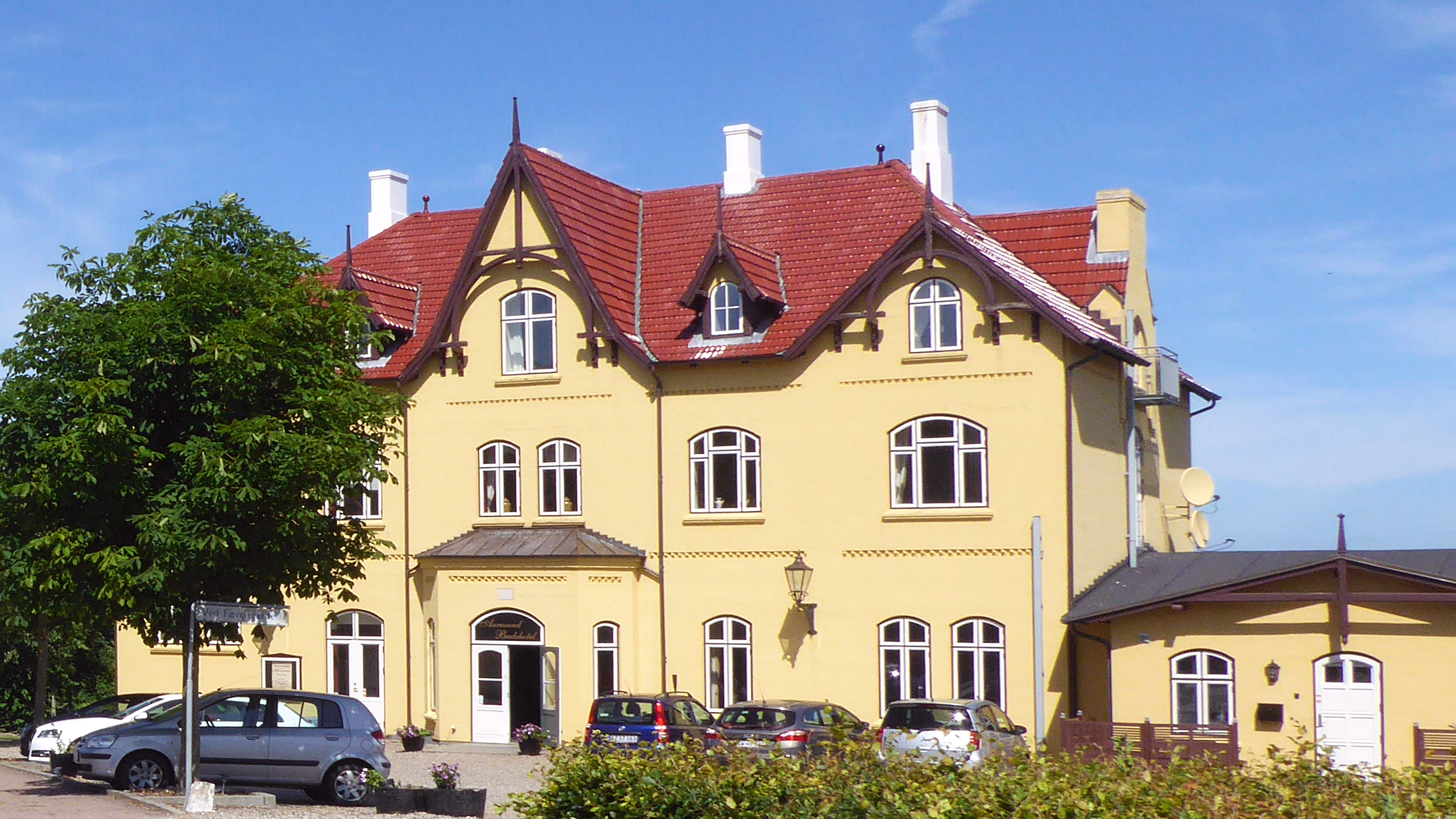 Hotelgebäude am Færgegården in Årøsund - Sønderjylland Syddanmark Jütland Dänemark Foto Wolfgang Pehlemann P1210679